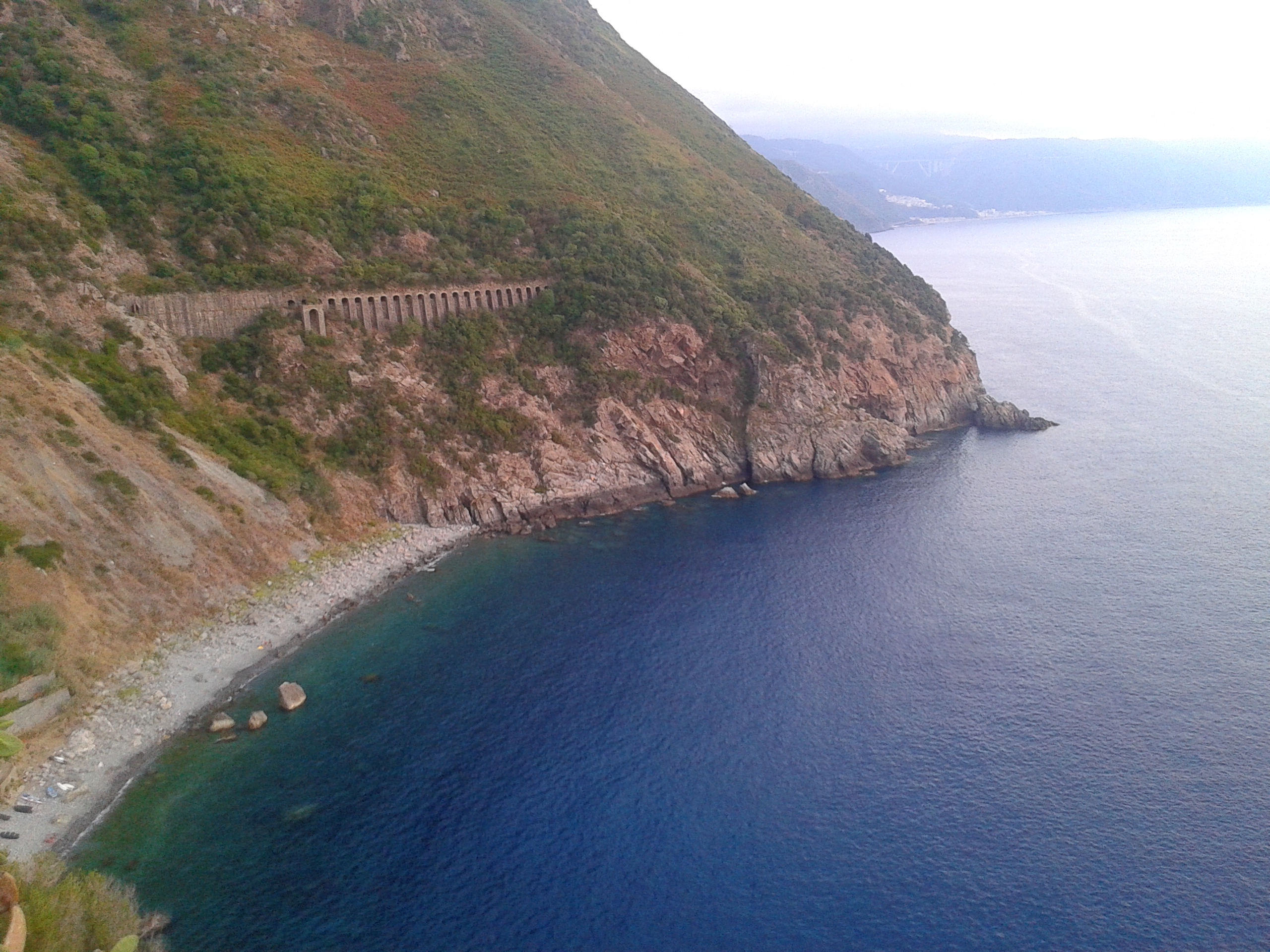 Baia della Marina di Palmi 2